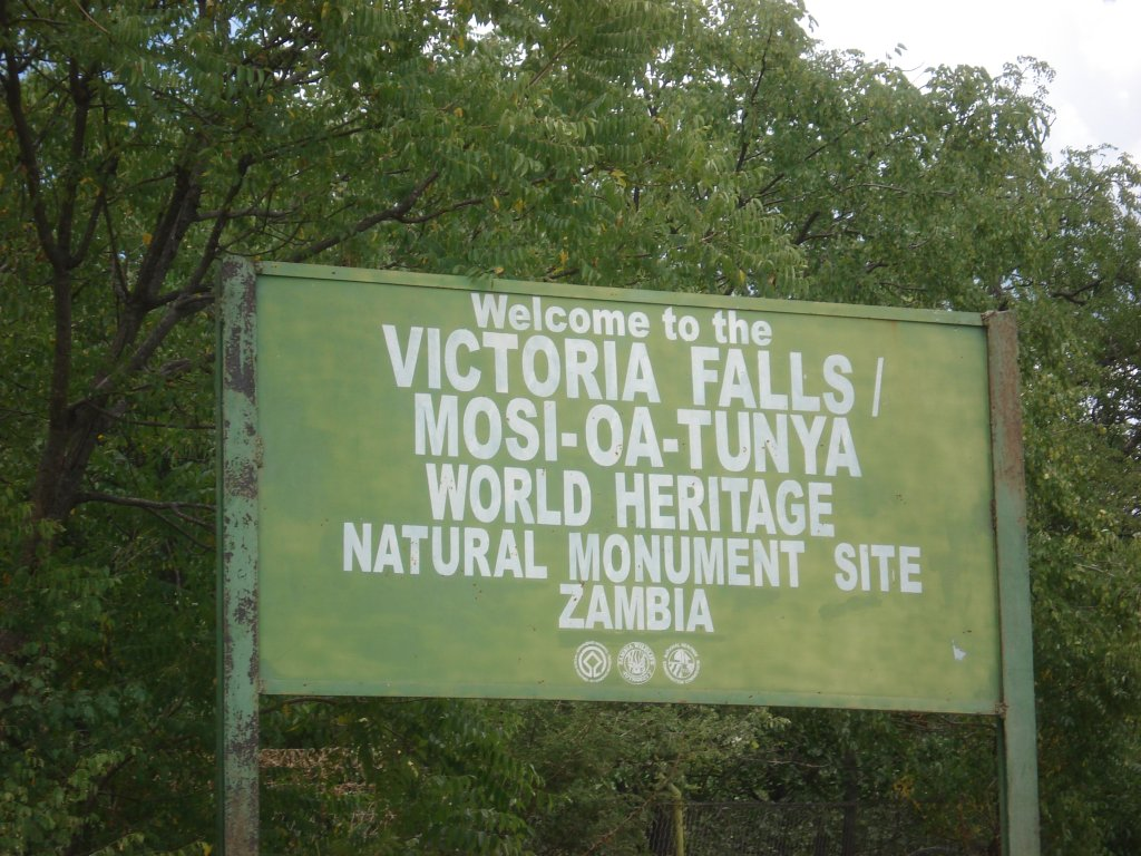 Victoria Falls Bridge Entrance